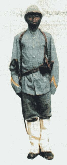 "Belanda Hitam"- Soldier from Elmina for KLN